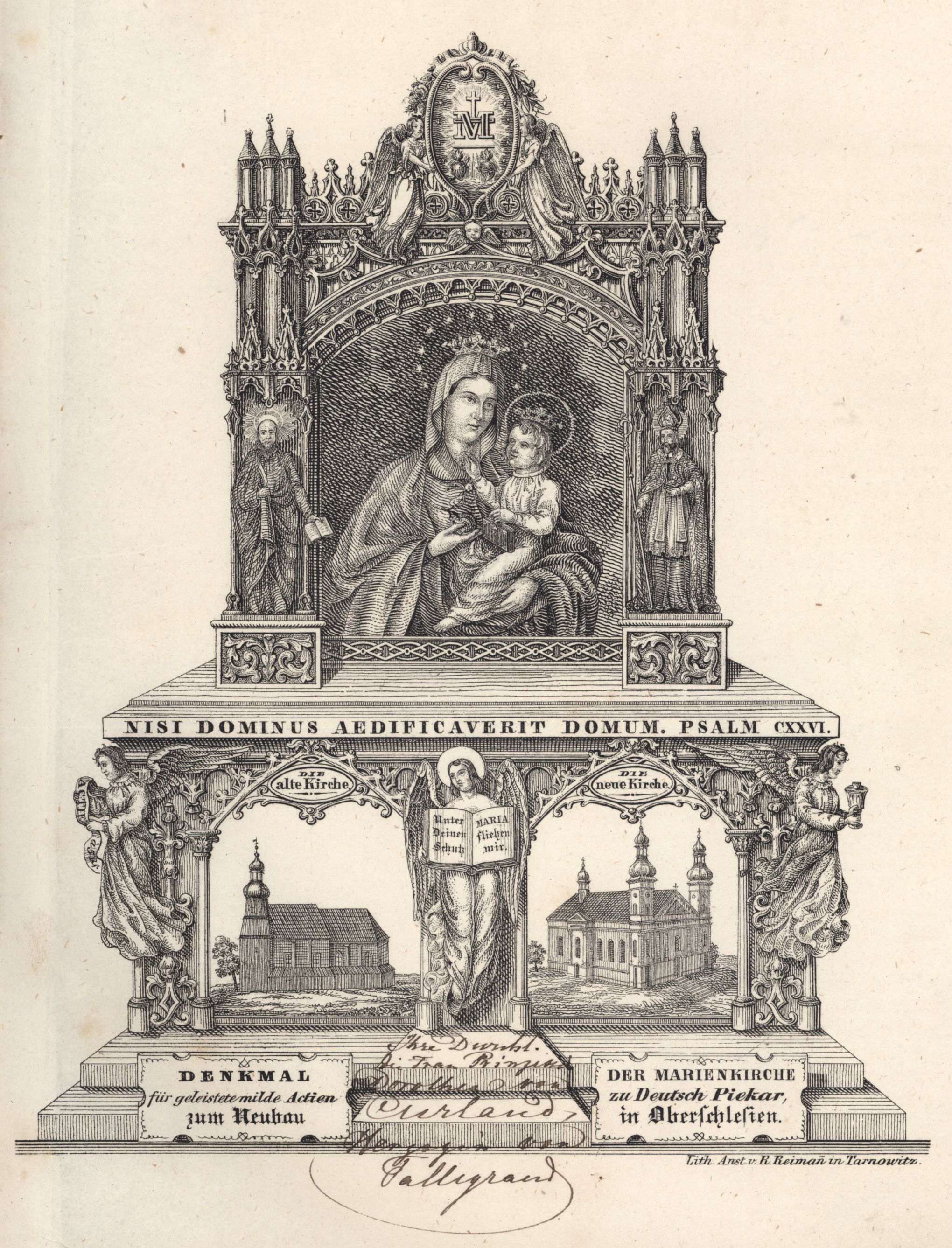 Źródło: Archiwum Państwowe w Zielonej Górze. Zespół archiwalny: Archiwum Książąt Żagańskich, sygn. 178/274, k. 5.